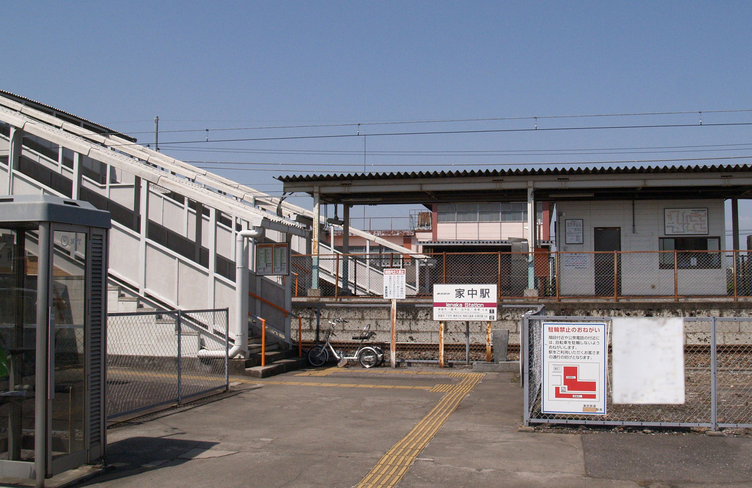 家中駅東口